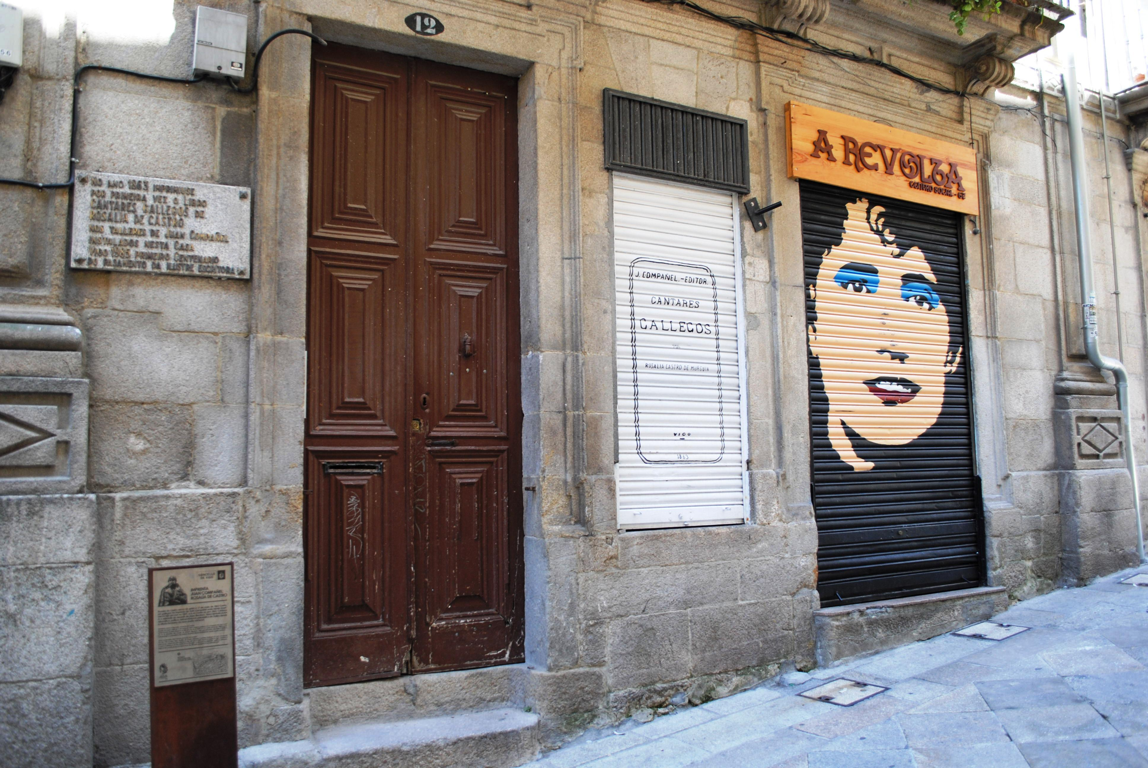 Vexa o título e as categorías.